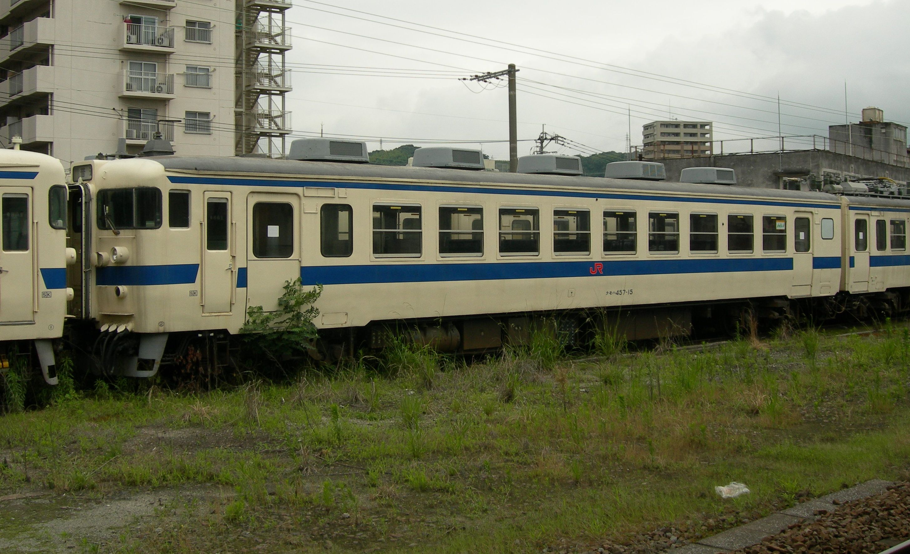 国鉄457系電車 クモハ457